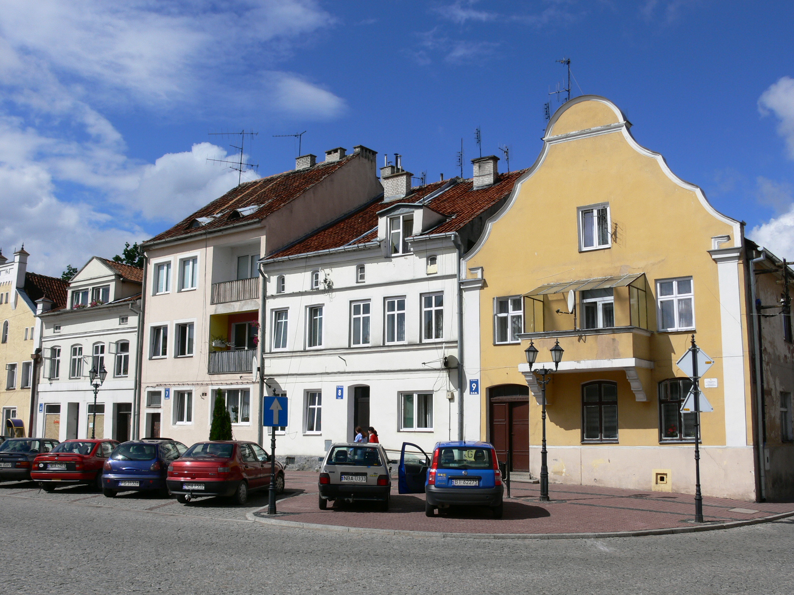 Górowo Iławeckie - fragment rynku